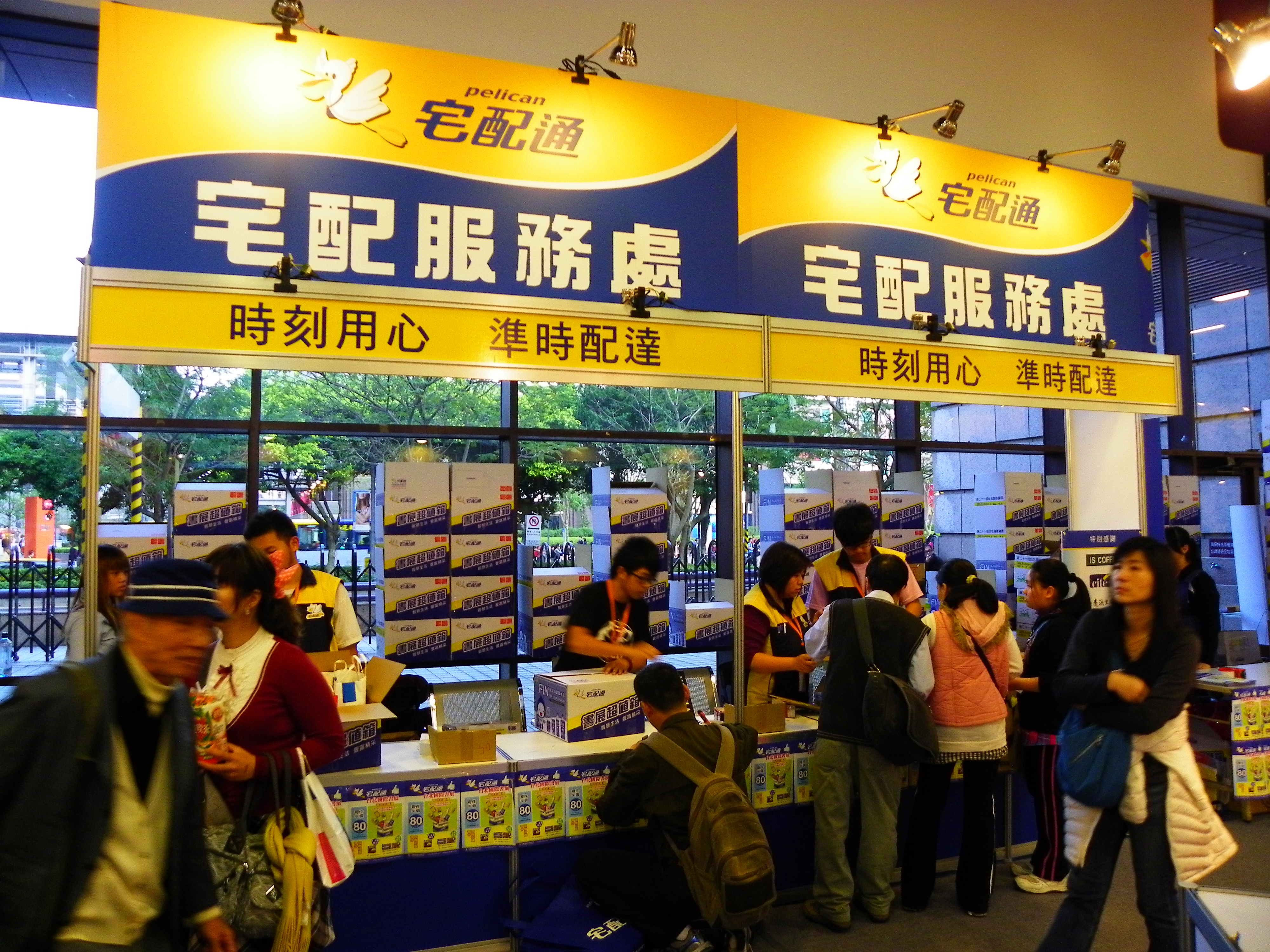 2013年臺北國際書展，世貿一館台灣宅配通宅配服務處。